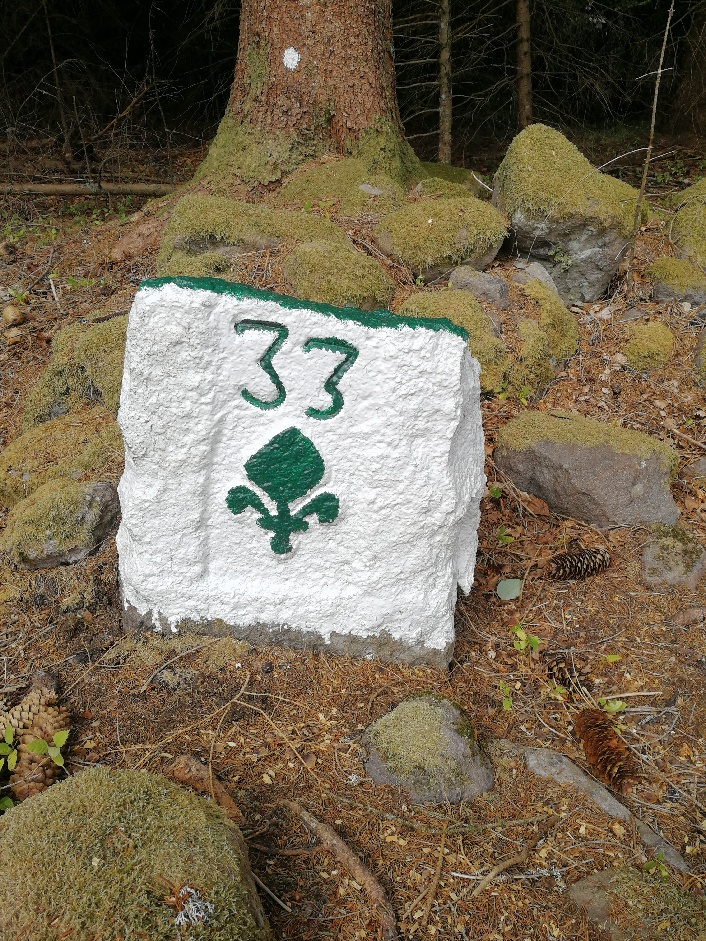 Cliché pris entre les communes de Murat et Albepierre (Cantal)